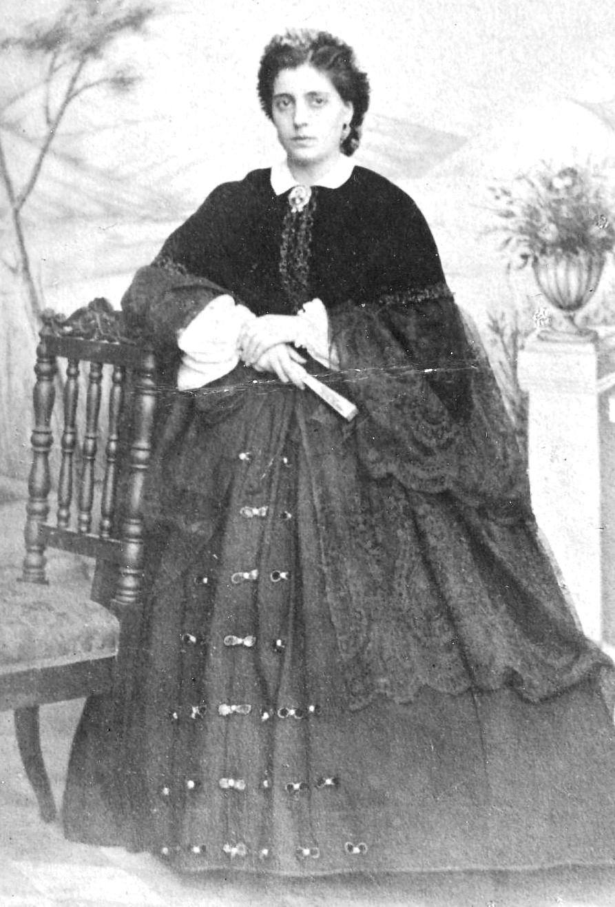 Matilde Temes Trujeda, muller de Valentín García Escudero (1833-1912), político galego que foi alcalde de Pontevedra.